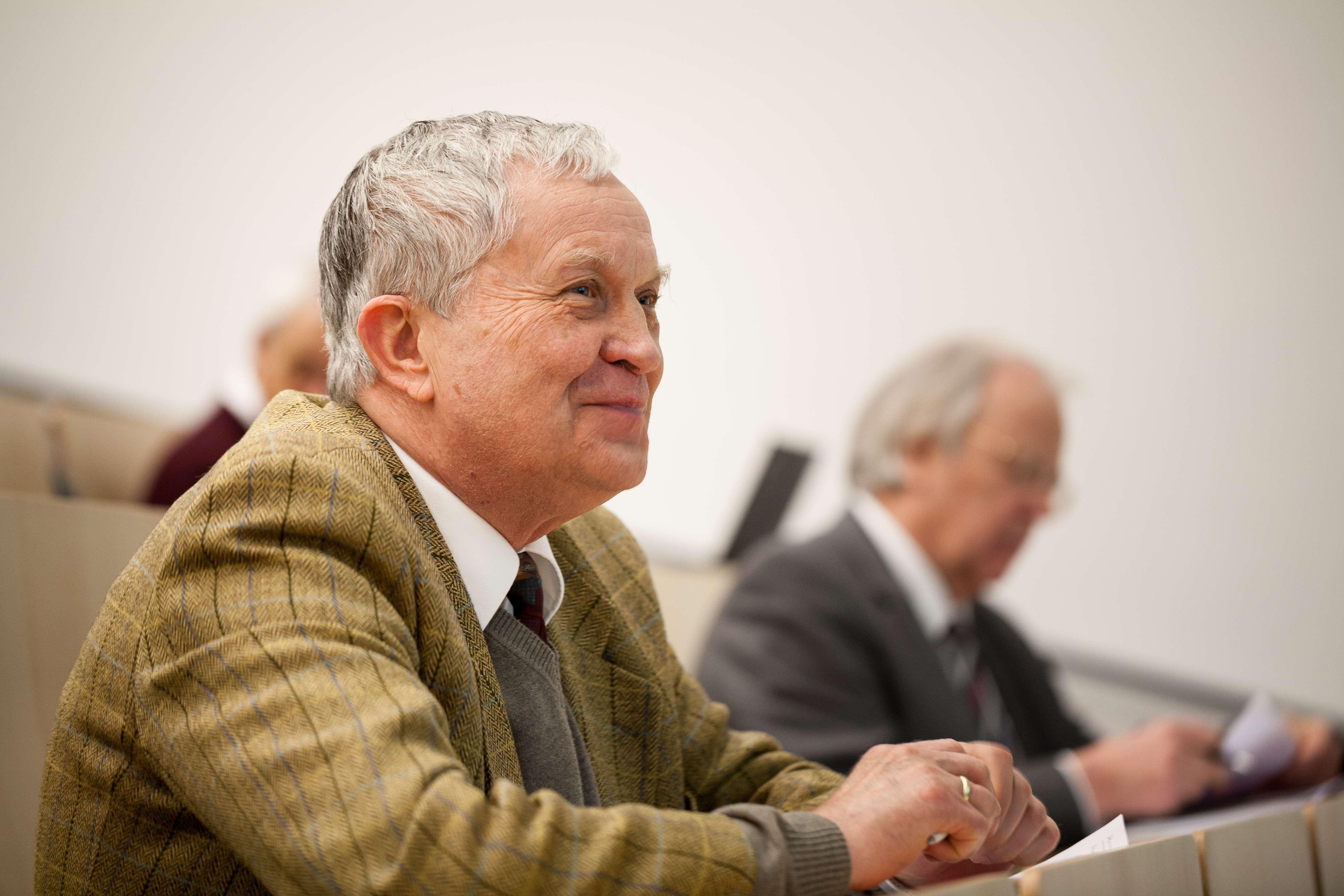 Prof. Karl Jug, 31. Januar 2014, 15. ZFM Festkörpertag, Universität Hannover